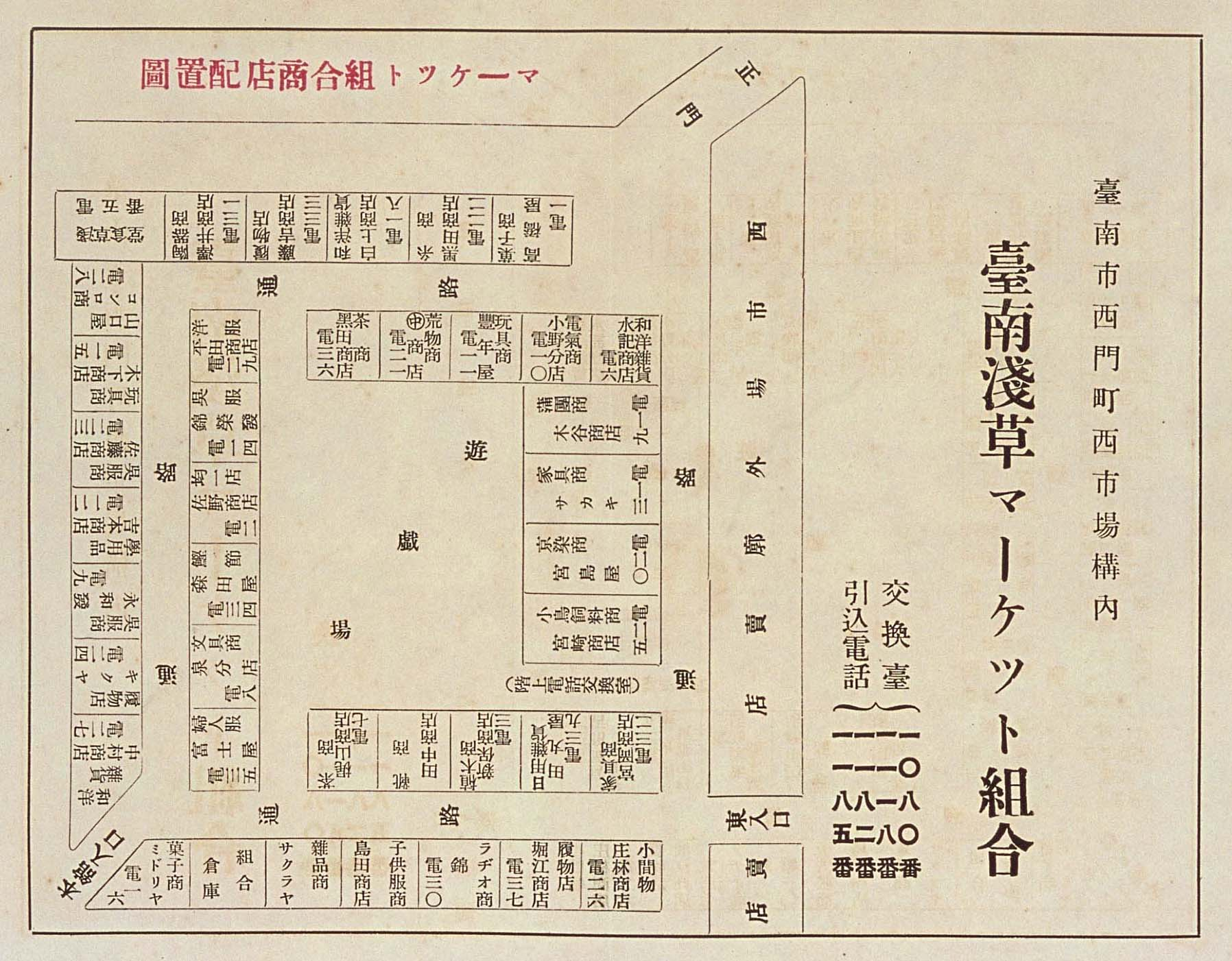 中文（台灣）: 淺草商場為1933年在台南市西市場中庭興建的商場，現今為西門商場，大部分為布商。